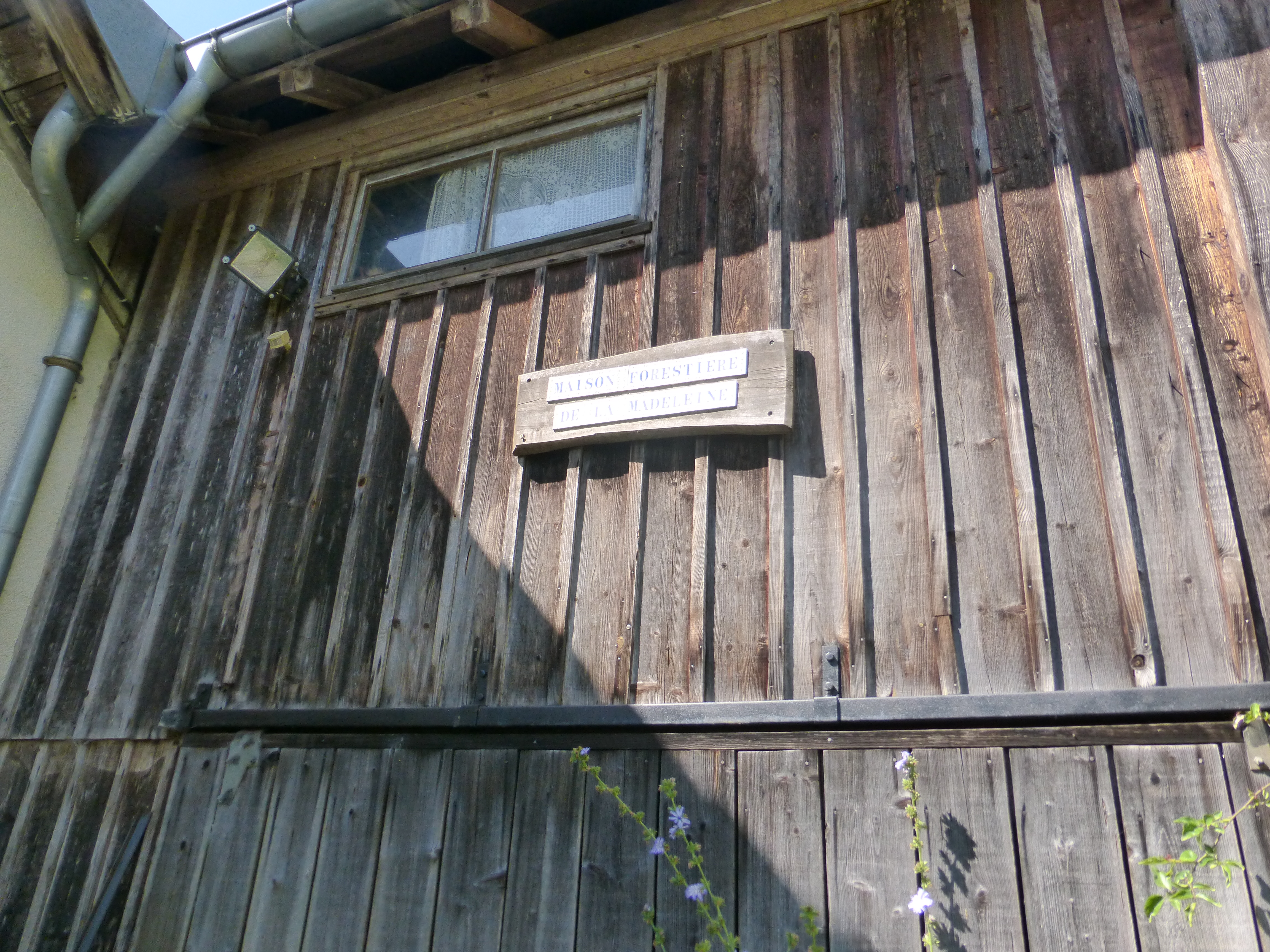 Maison forestière de La Madeleine à La Bolle - plaque indicatrice